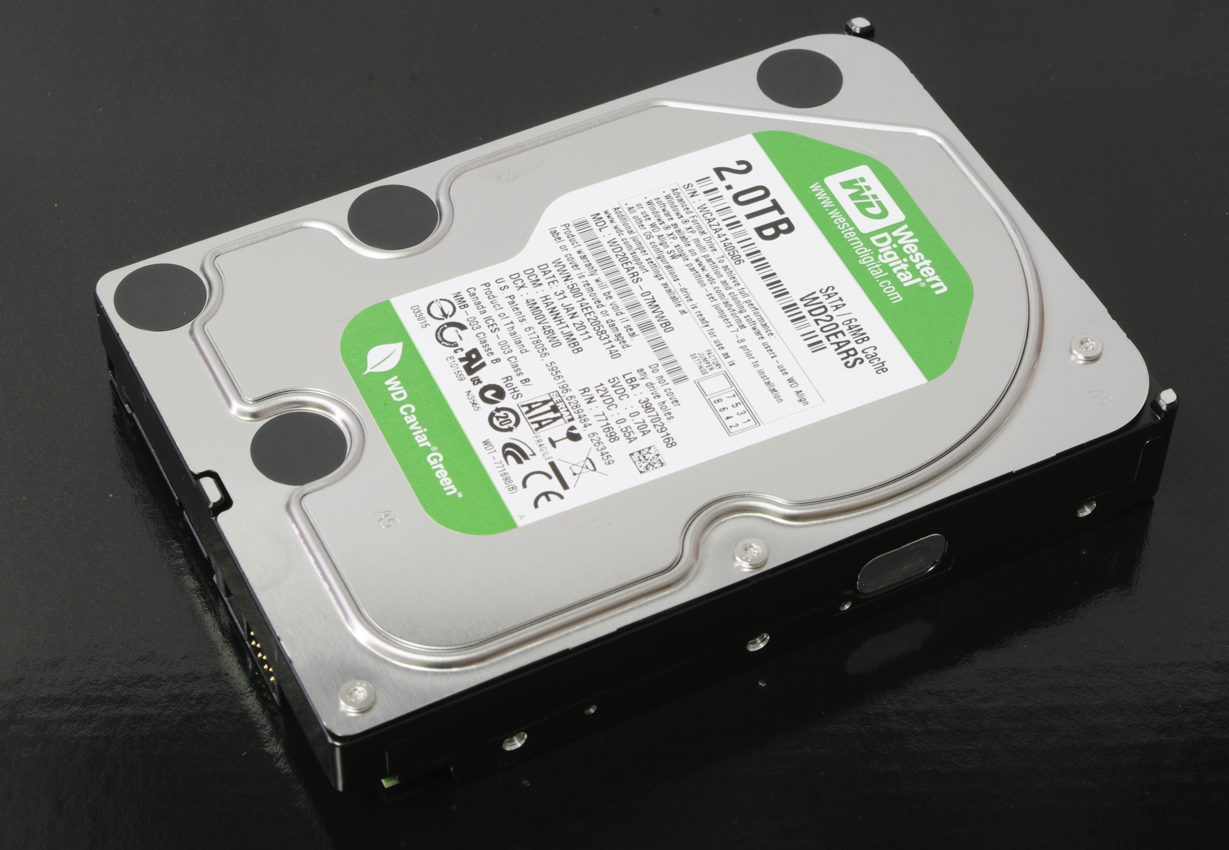 WD20EARS